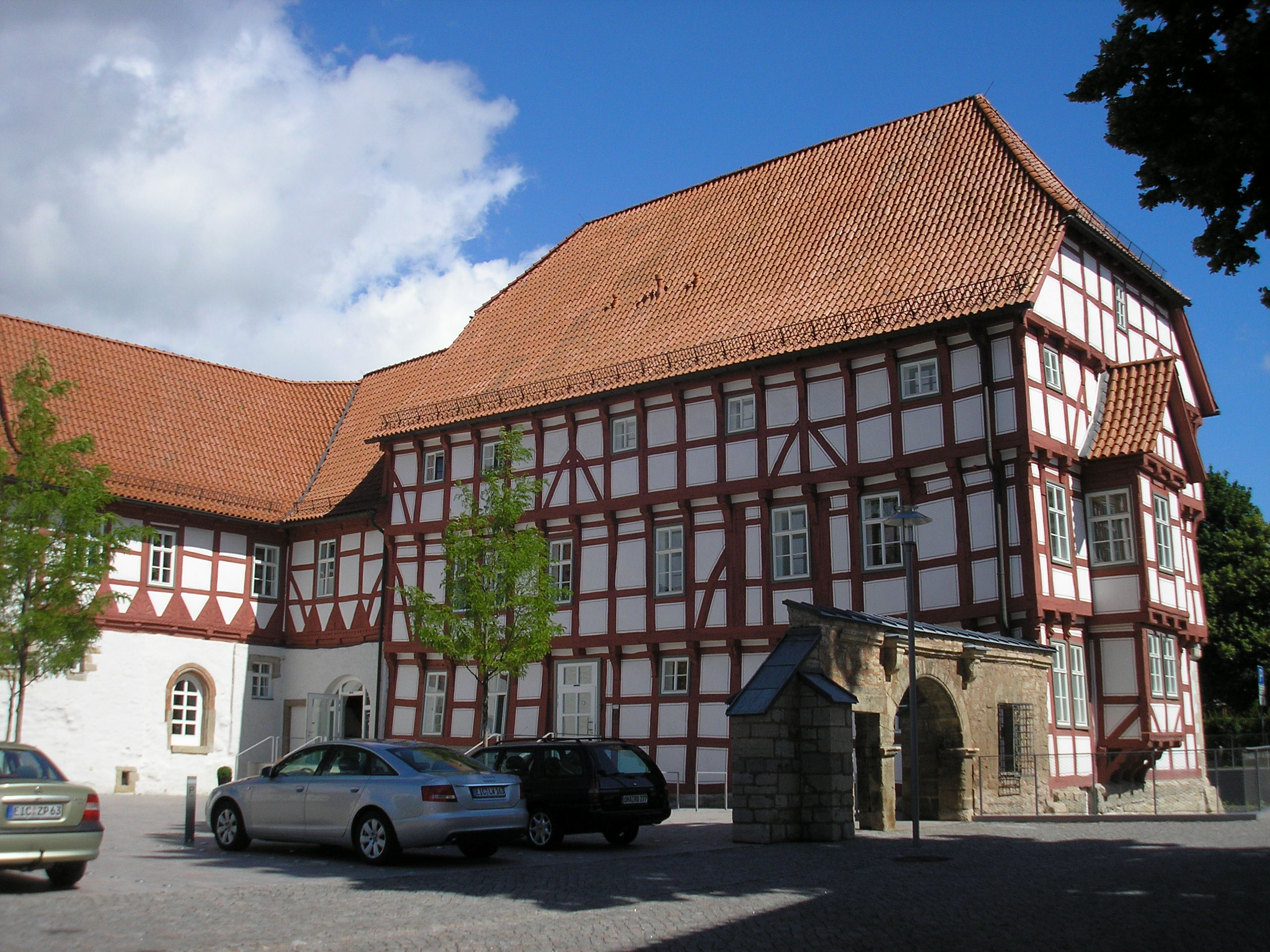 Das Rathaus in Worbis (Thüringen).